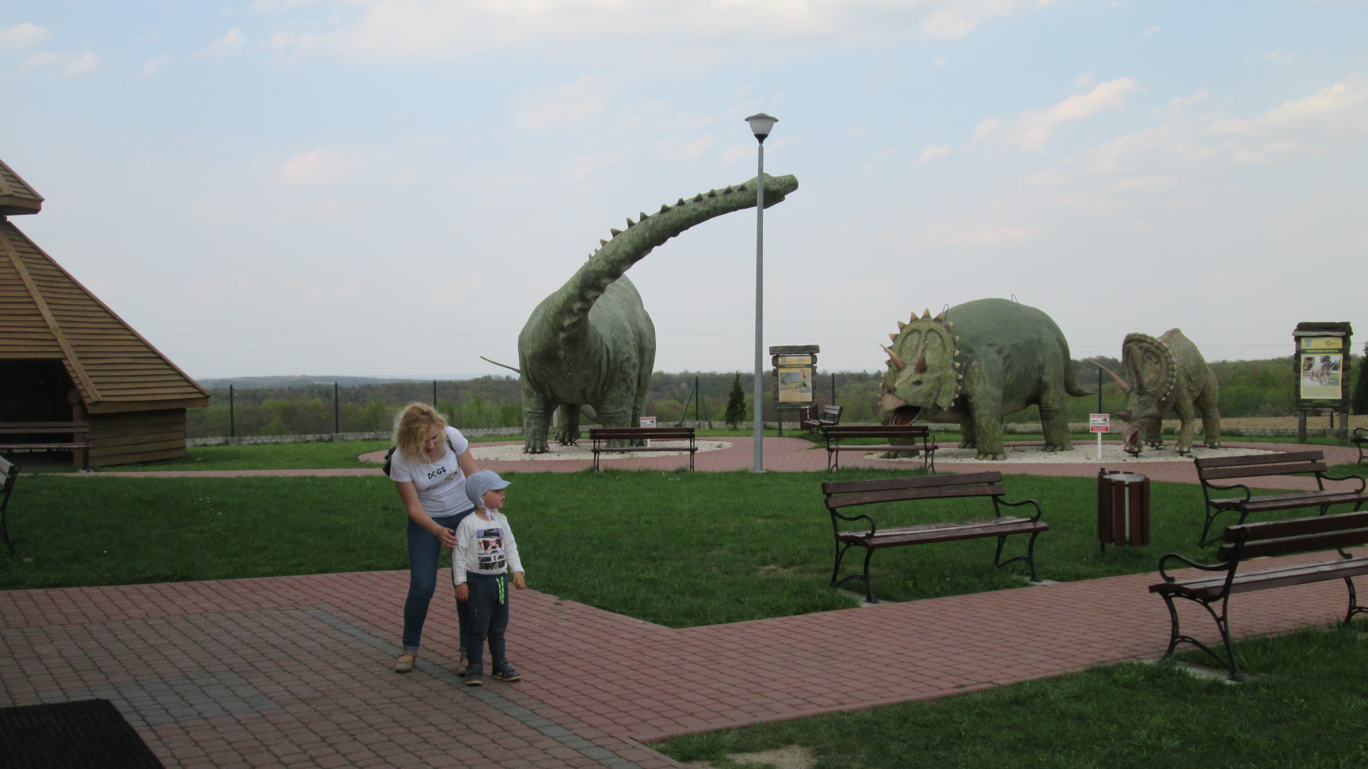 Park dinozaurów w Głobikowej